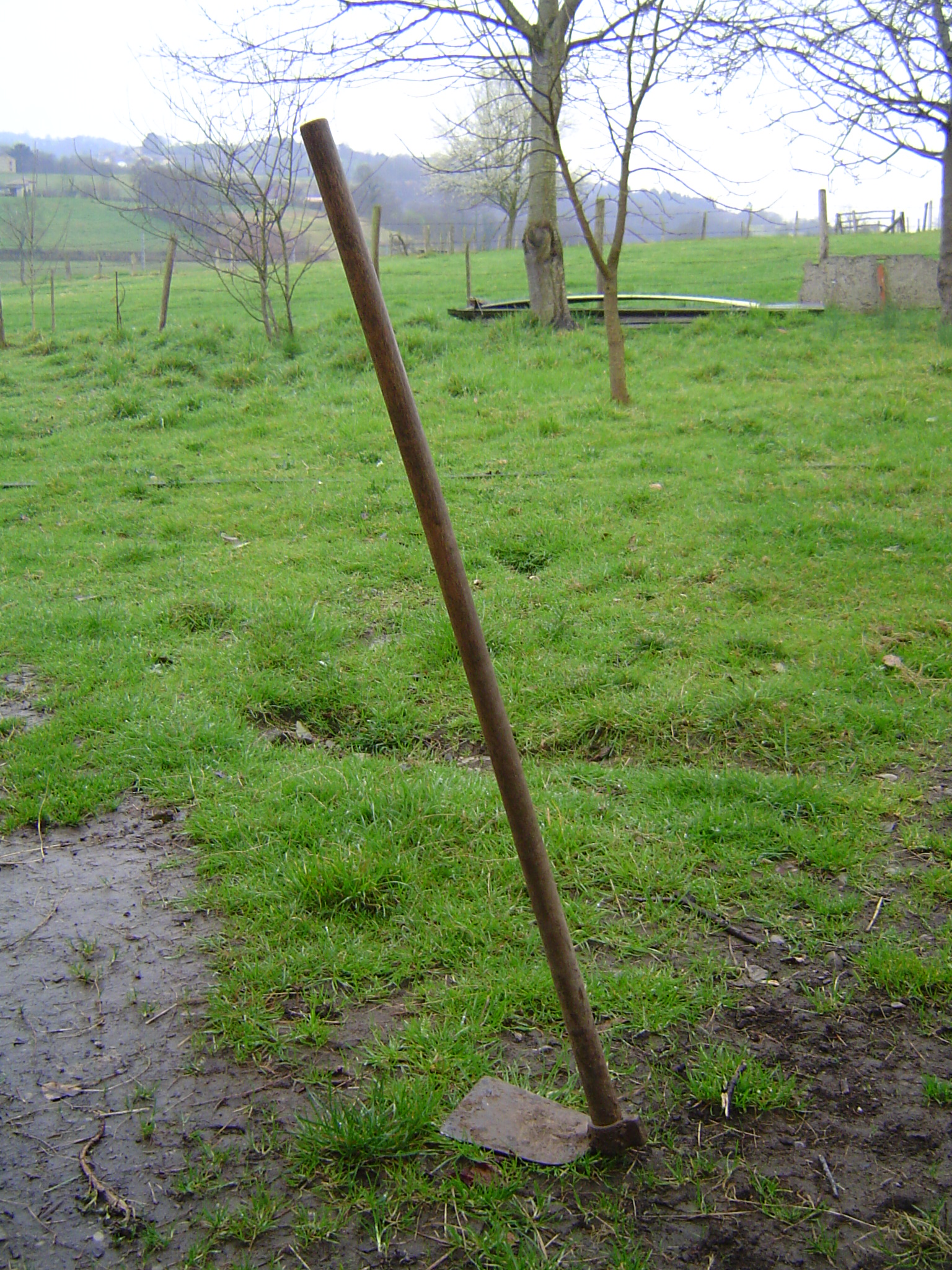 La fesoria n'asturies